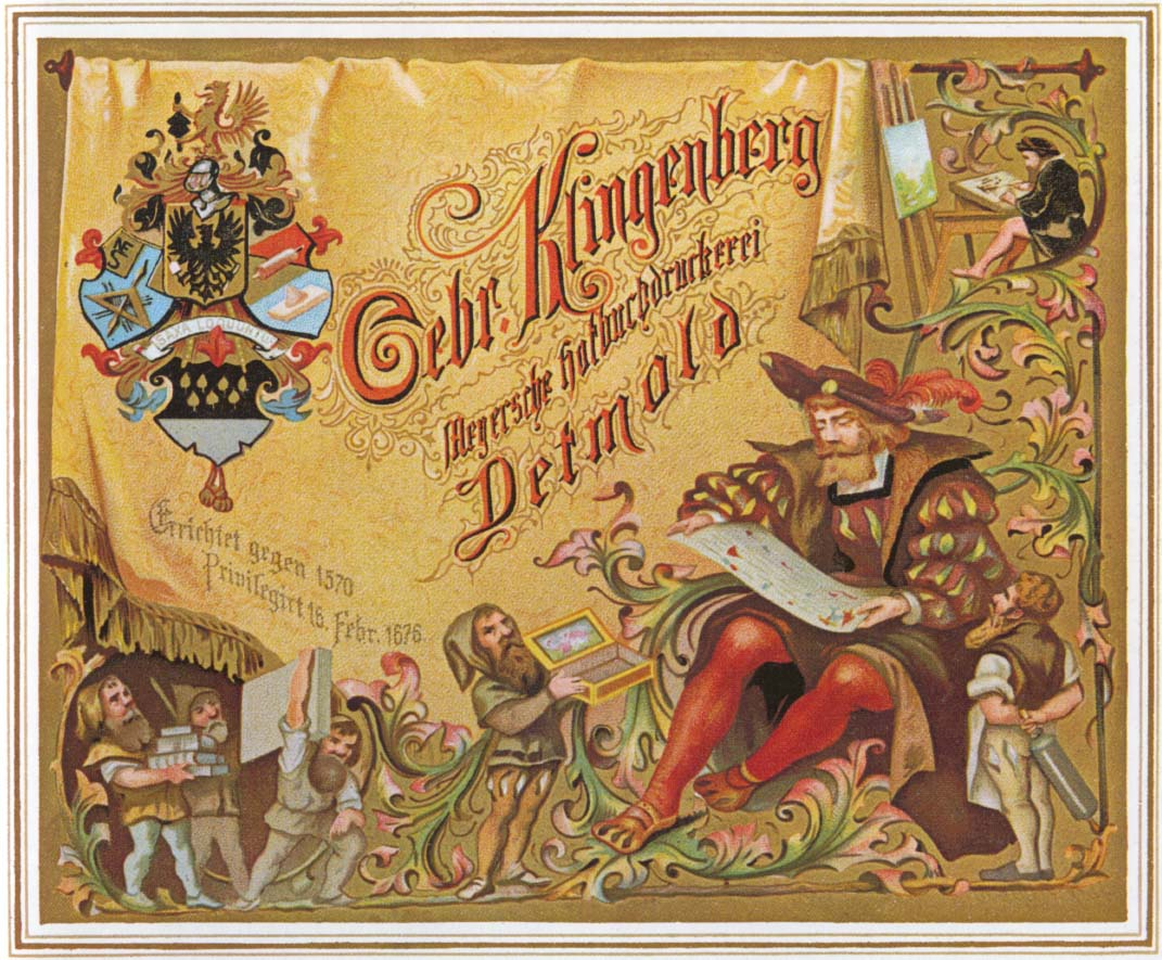 Eigenwerbung der Detmolder Firma Gebr. Klingenberg aus den 1880er Jahren, Chromolithografie